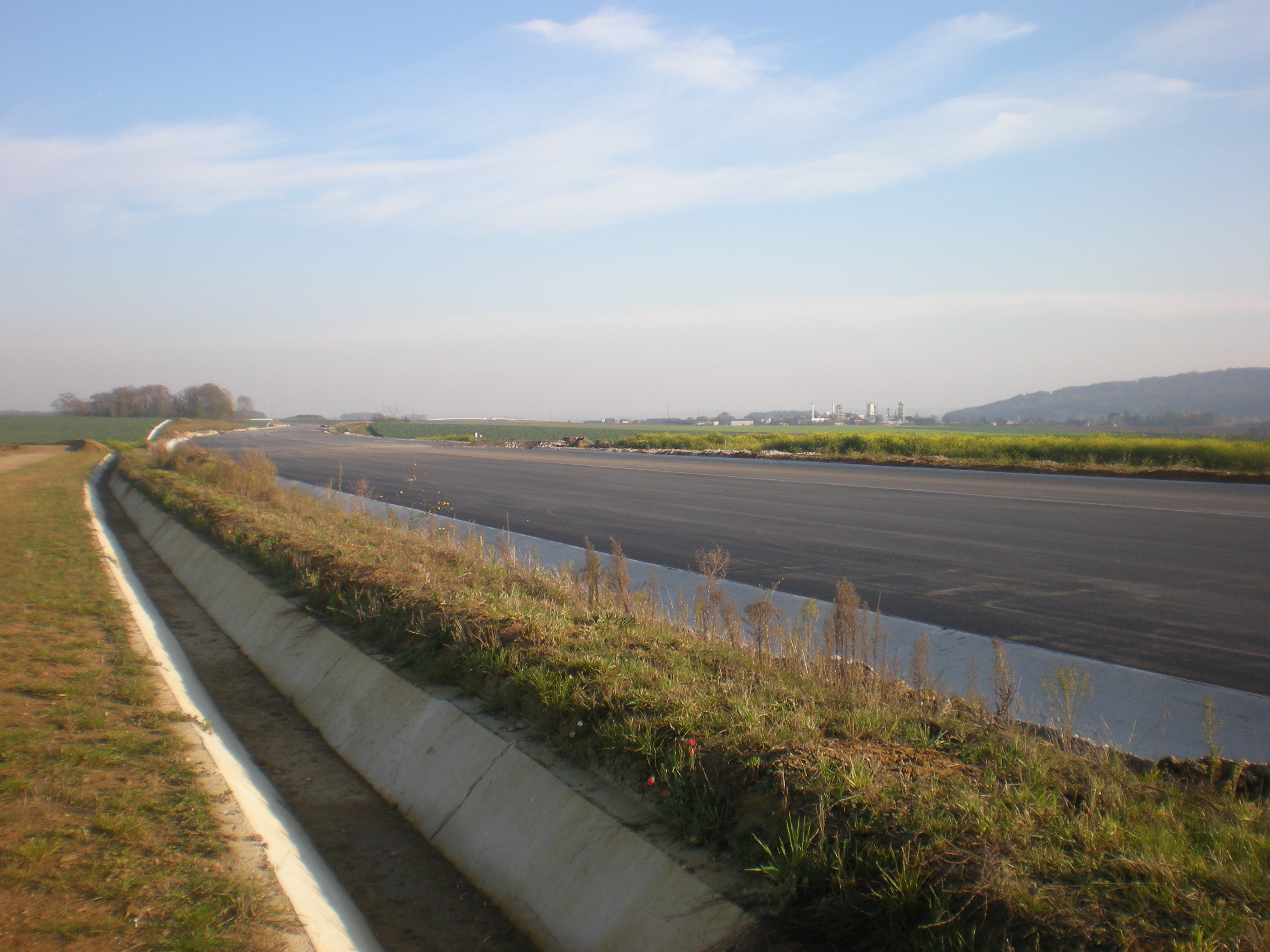 la déviation en construction de la route nationale 31